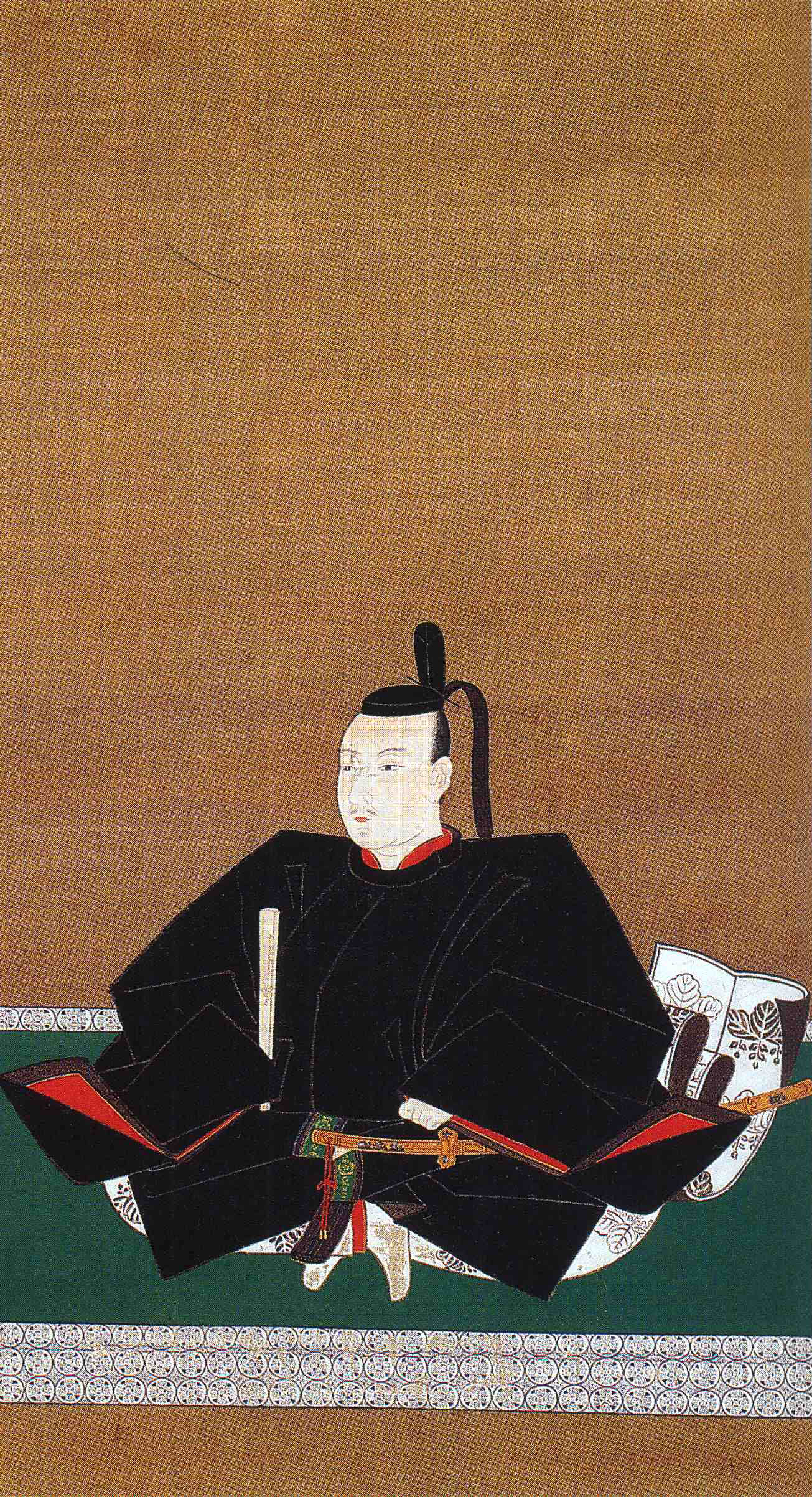 織田信忠画像